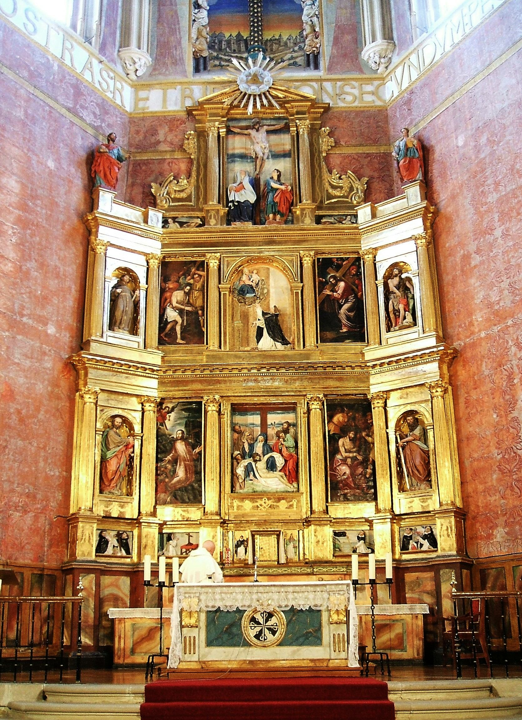 Retablo mayor barroco (siglo XVII) de la iglesia del Monasterio de monjas dominicas de Nuestra Señora de la Piedad, en Casalarreina, La Rioja, España/Spain